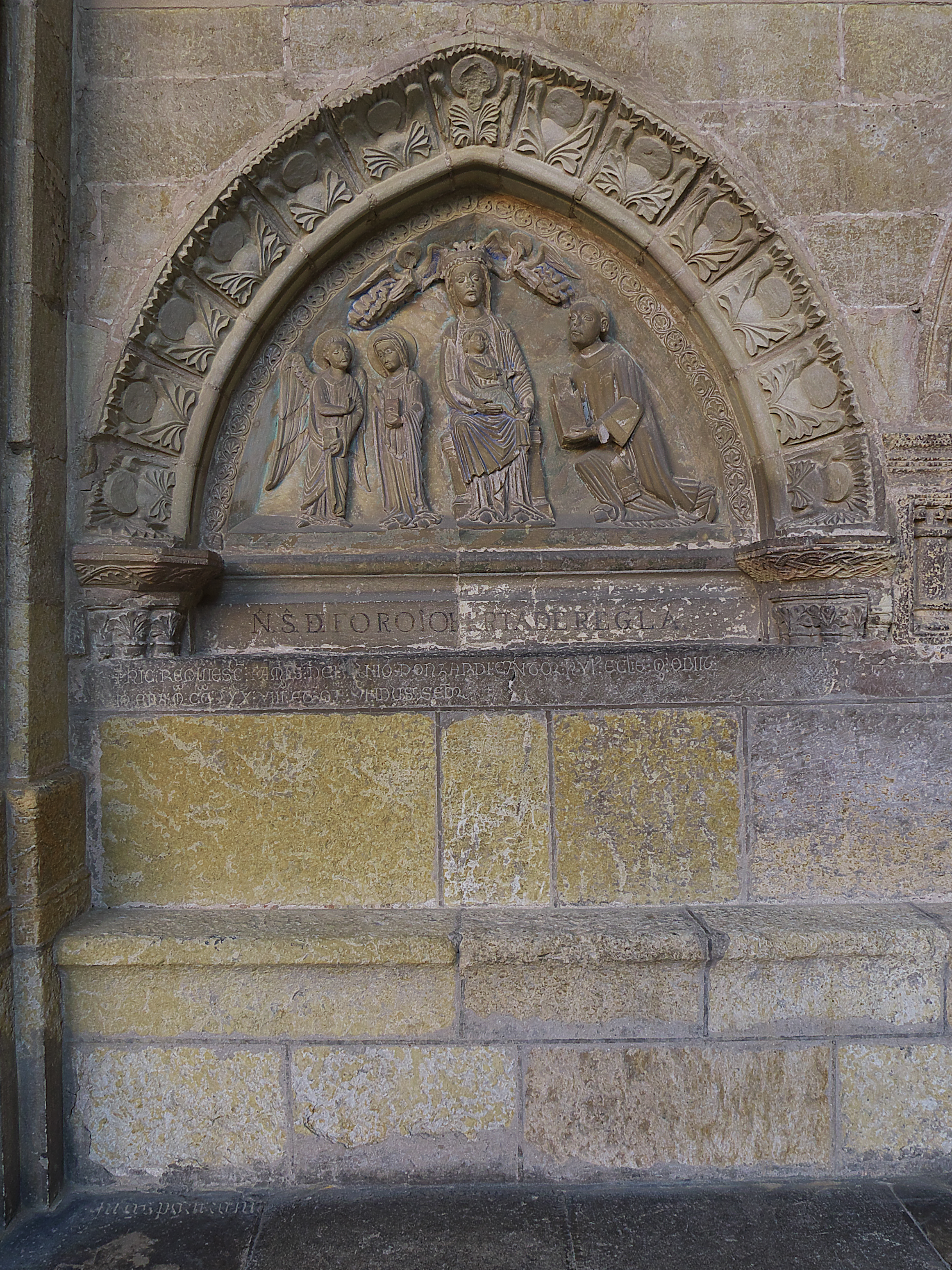 Claustro de la Catedral de León. Sepulcro del chantre Munio Ponzardi (†1240), cuyo tímpano en una obra interesantísima por su calidad y figurativismo de comienzos del gótico. La Virgen de Regla parece ausente ante el obsequio del clérigo.